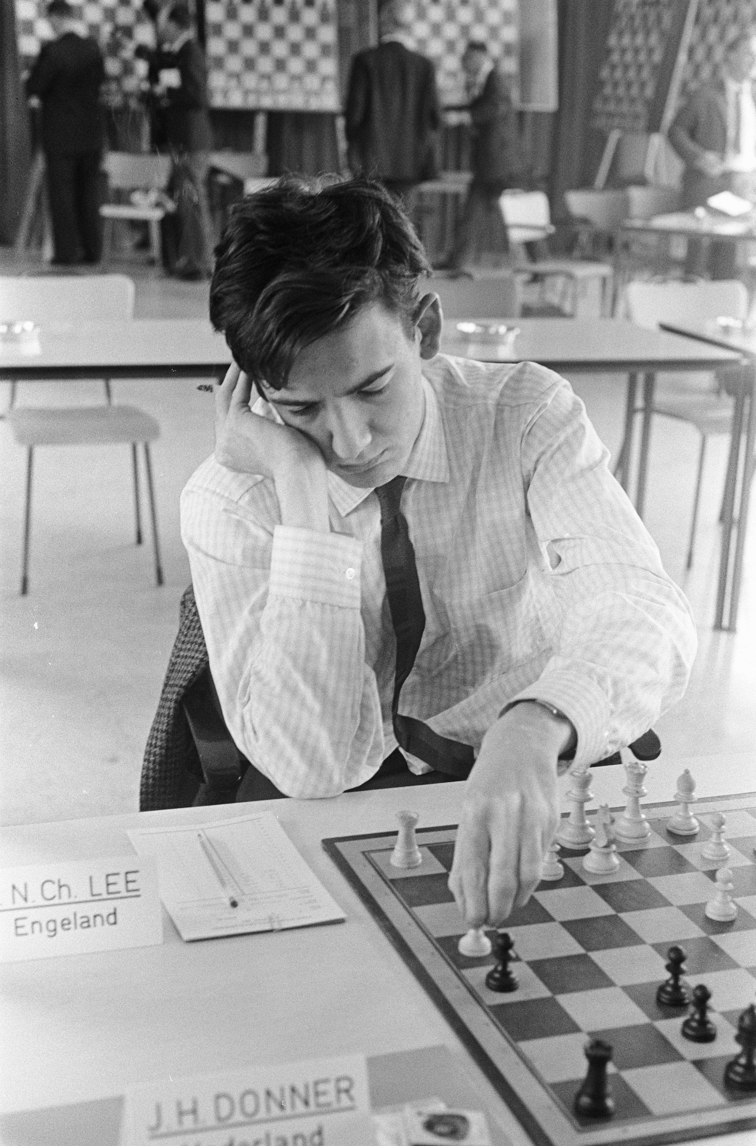 Collectie / Archief : Fotocollectie Anefo Reportage / Serie : Fédération Internationale des Échecs (FIDE) -Zone schaaktoernooi 1966 in de kantine van 'De Nederlanden van 1845' te Den Haag Beschrijving : Peter Nicholas Lee aan het schaakbord Annotatie : randnummers negatiefstrook: 18,19 en 20 Datum : 13 september 1966 Locatie : Den Haag, Zuid-Holland Trefwoorden : schaken, sport, toernooien Fotograaf : Fotograaf Onbekend / Anefo Auteursrechthebbende : Nationaal Archief Materiaalsoort : Negatief (zwart/wit) Nummer archiefinventaris : bekijk toegang 2.24.01.05 Bestanddeelnummer : 919-5572